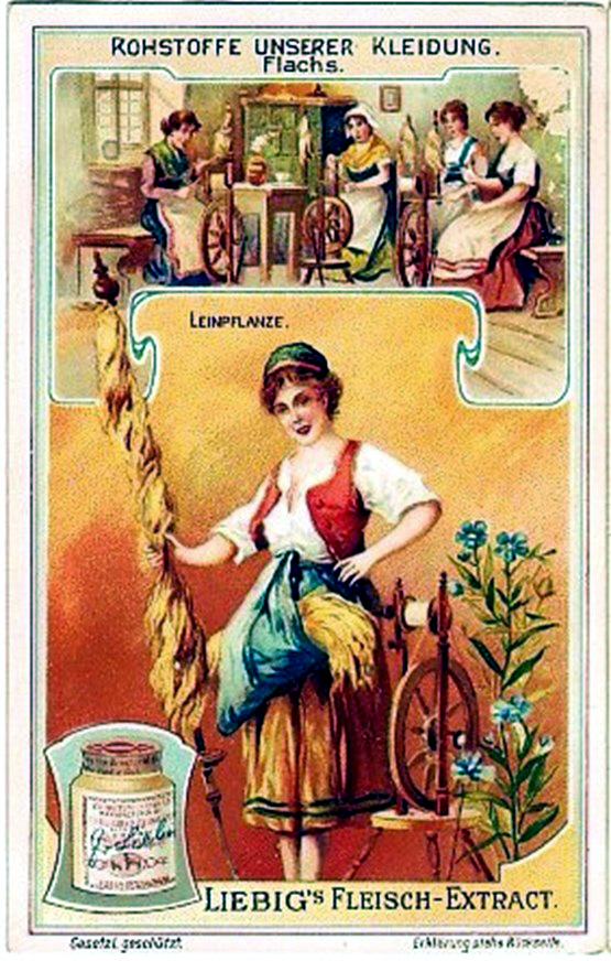 Liebig-Sammelbilder "Rohstoffe unserer Kleidung", Flachs